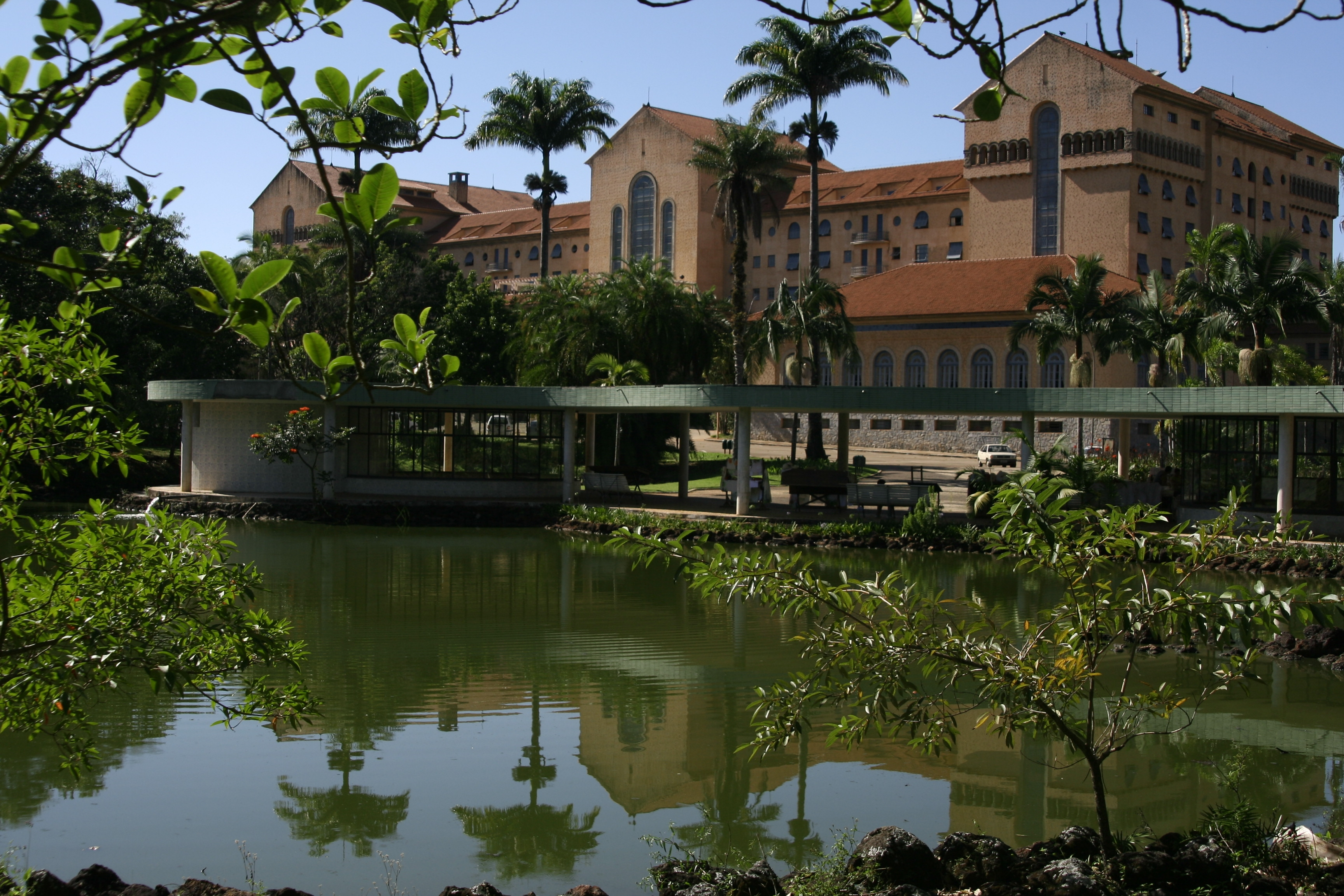 Grande Hotel de Araxá